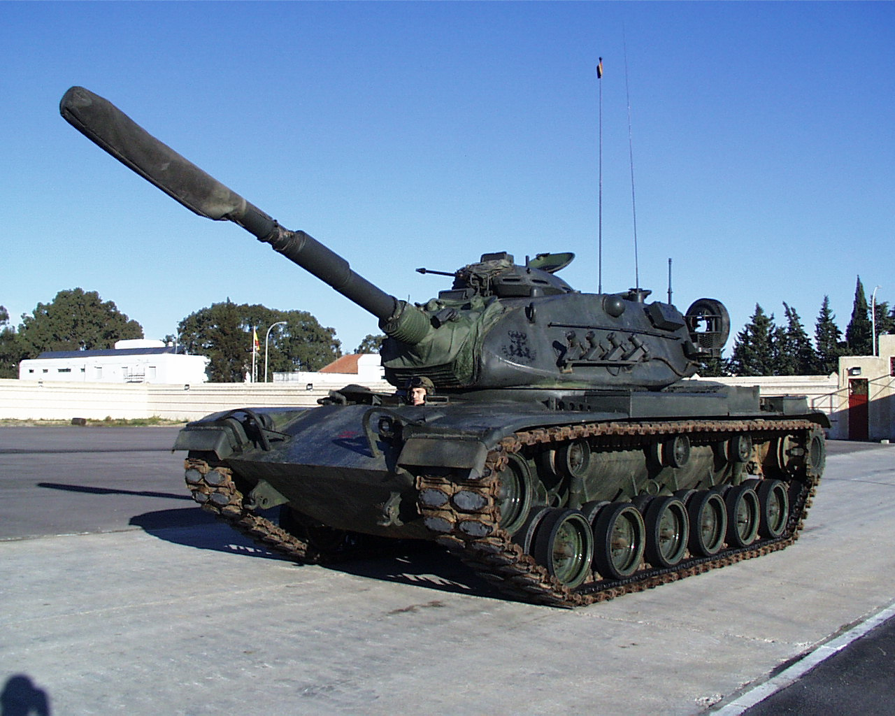 Carro de combate M60 A3 TTS de la Infantería de Marina